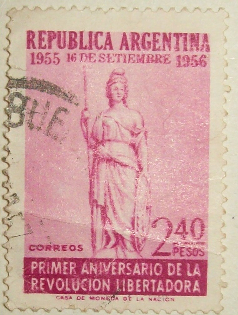 Stamp of Argentine commemorating the first anniversary of the Revolución libertadora.